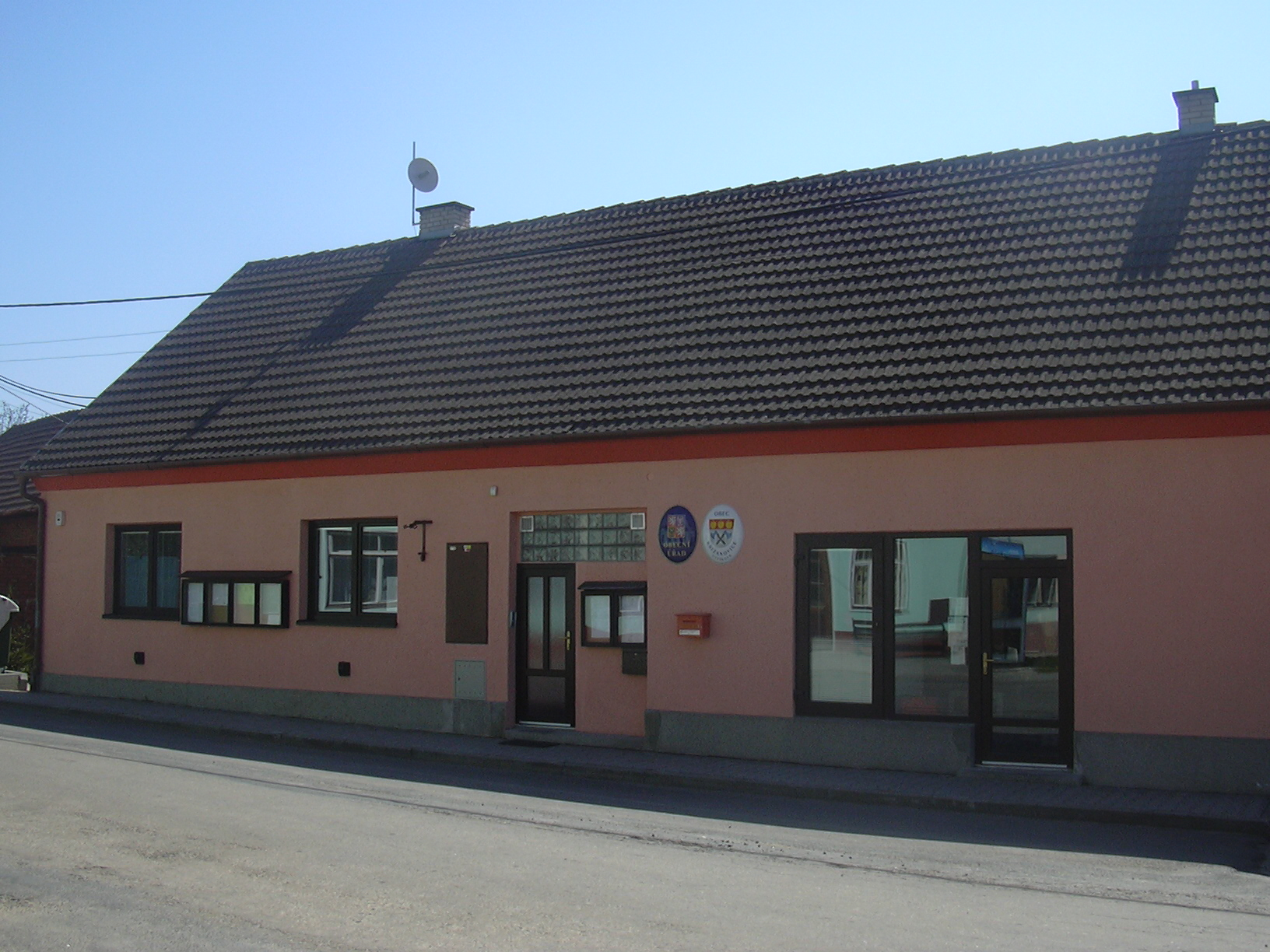 Křižanovice u Vyškova obecní úřad (Vyškov District, Czech Republic)